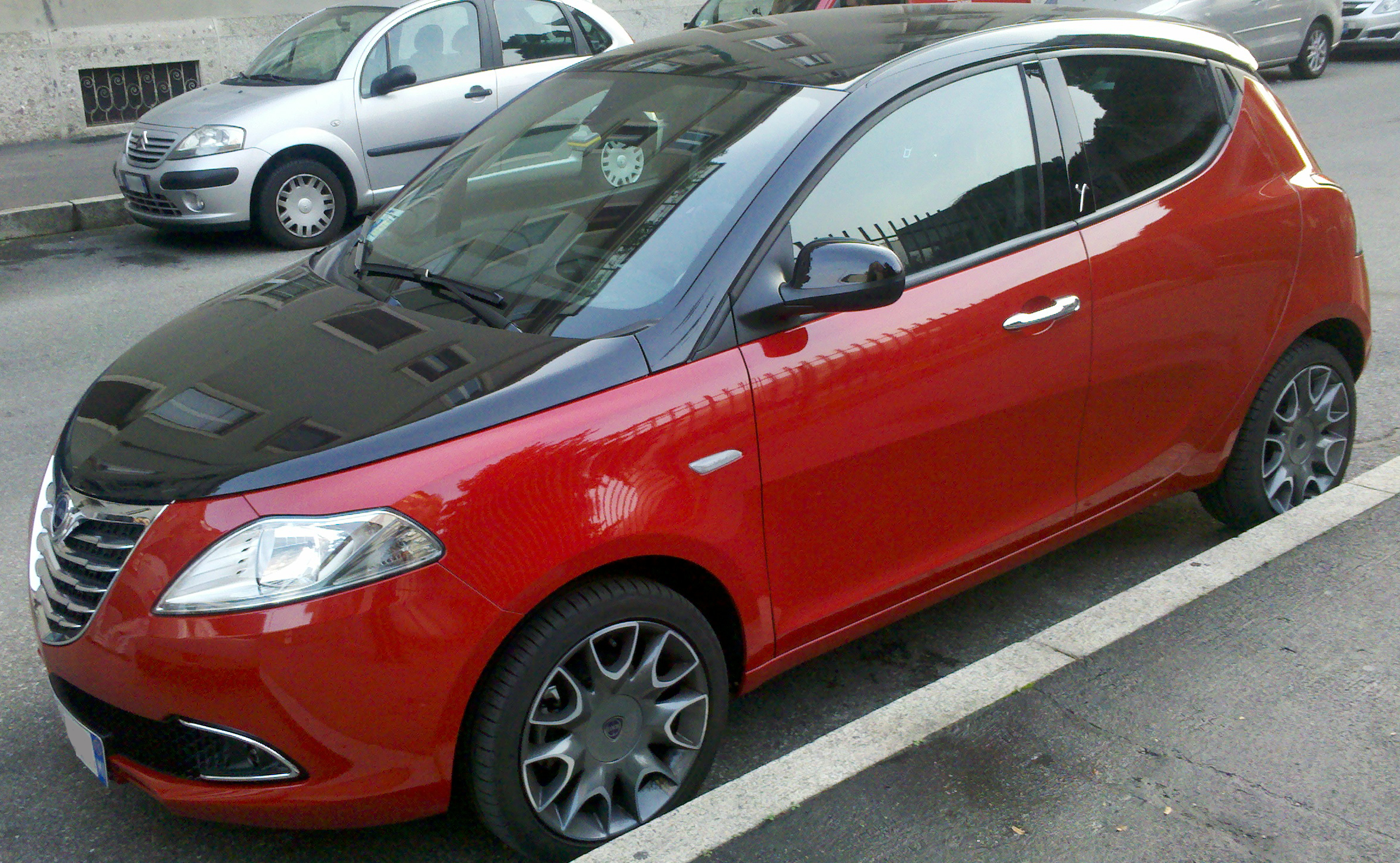 Una Lancia Ypsilon del 2011 a Milano